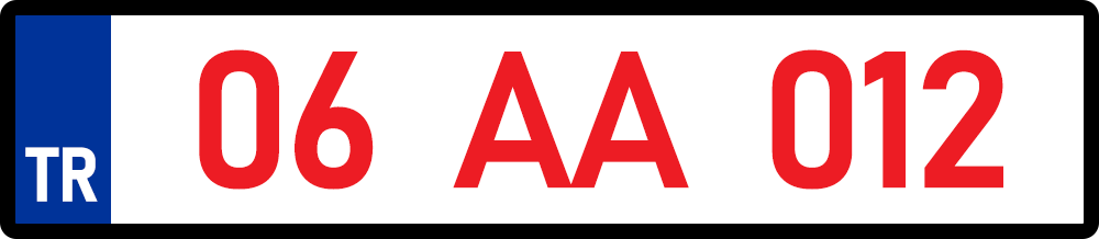 نمونه پلاک ترکیه